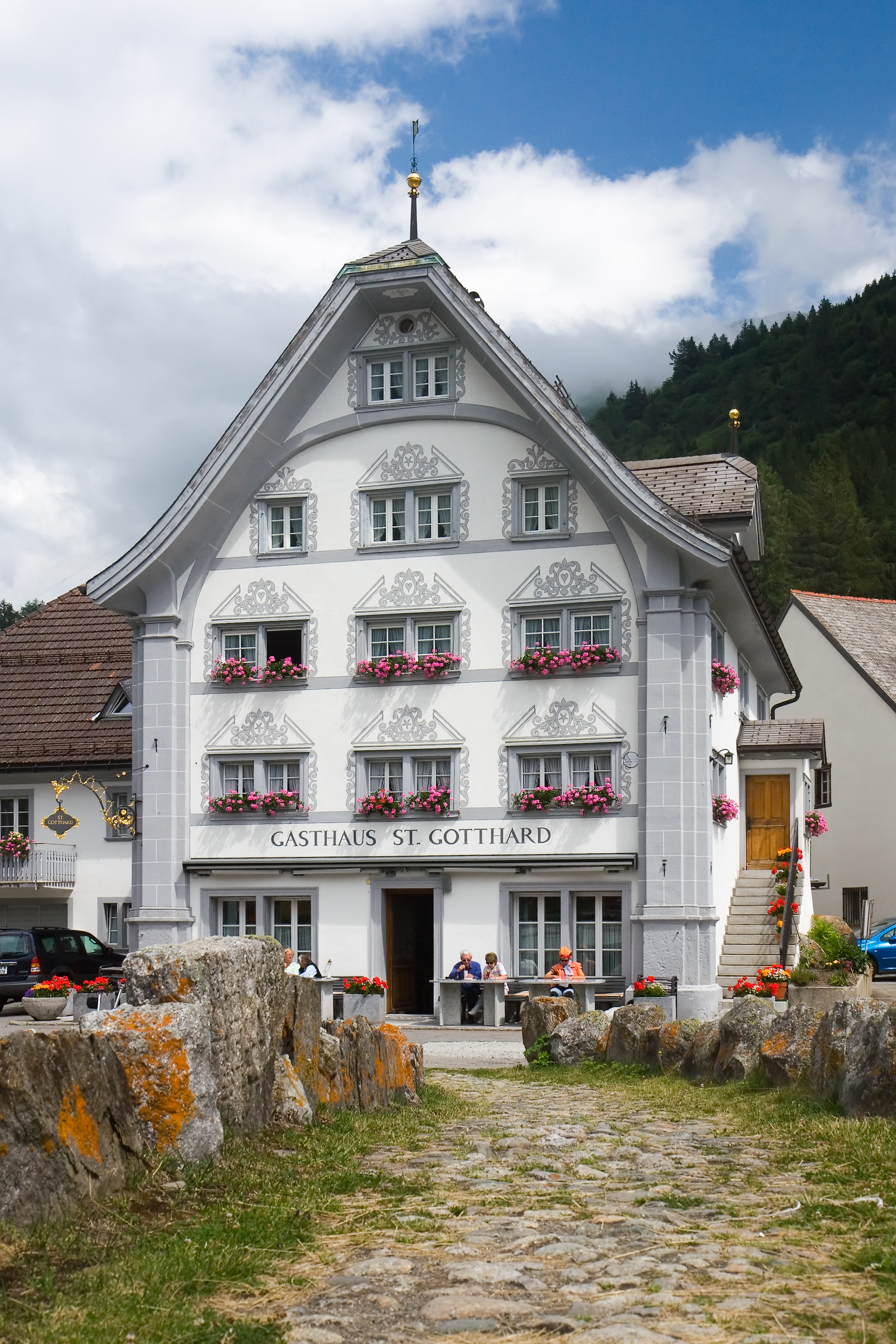 Gasthaus St. Gotthard in Hospental, Schweiz